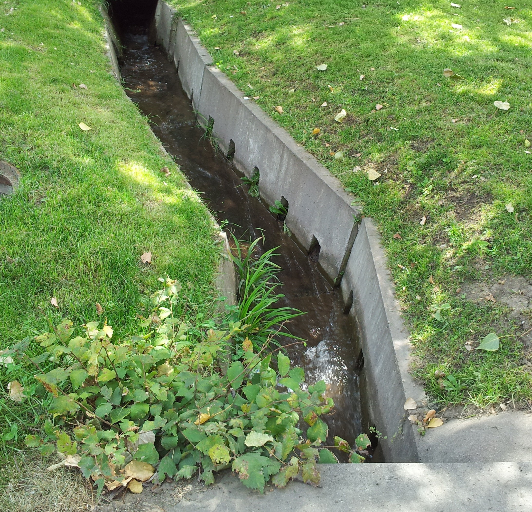 Арычная система в Алмате. Вода спускается с гор. Отверстия на дне арыка предназначены для полива деревьев рядом с арыком